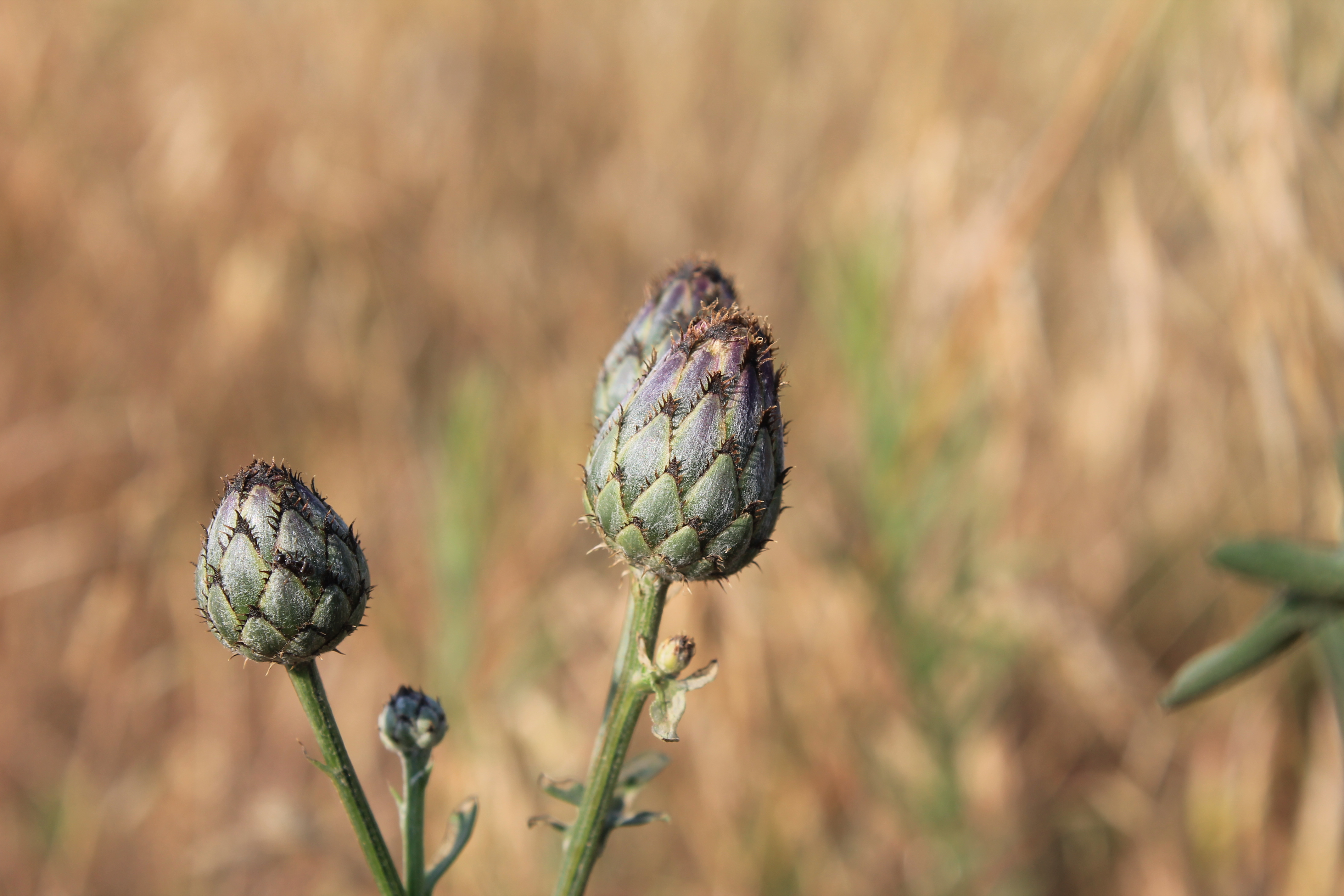 Волошка гострокінцева (Centaurea apiculata). с. Широке, Криворізький район.